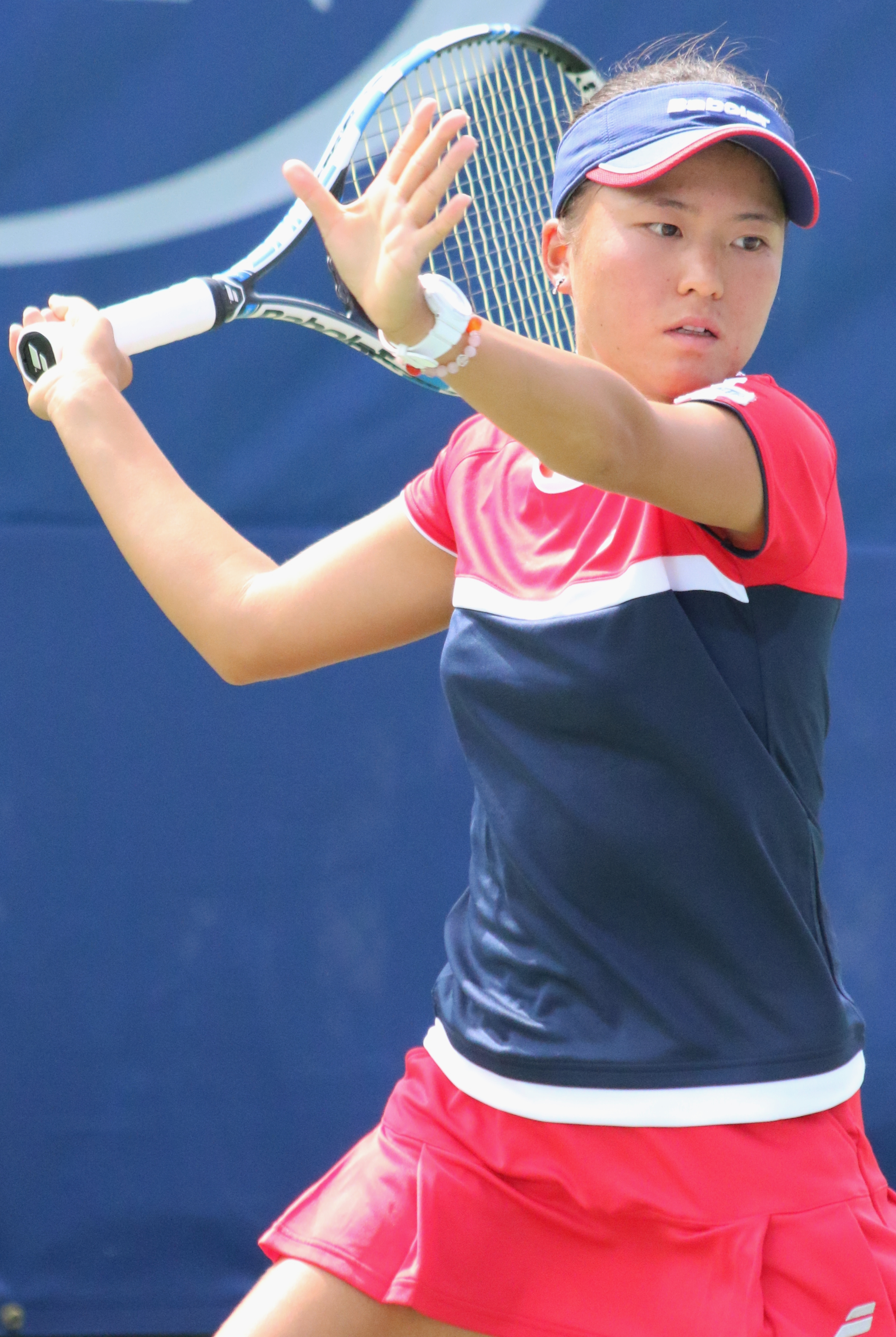 Ninomiya US16 (6)